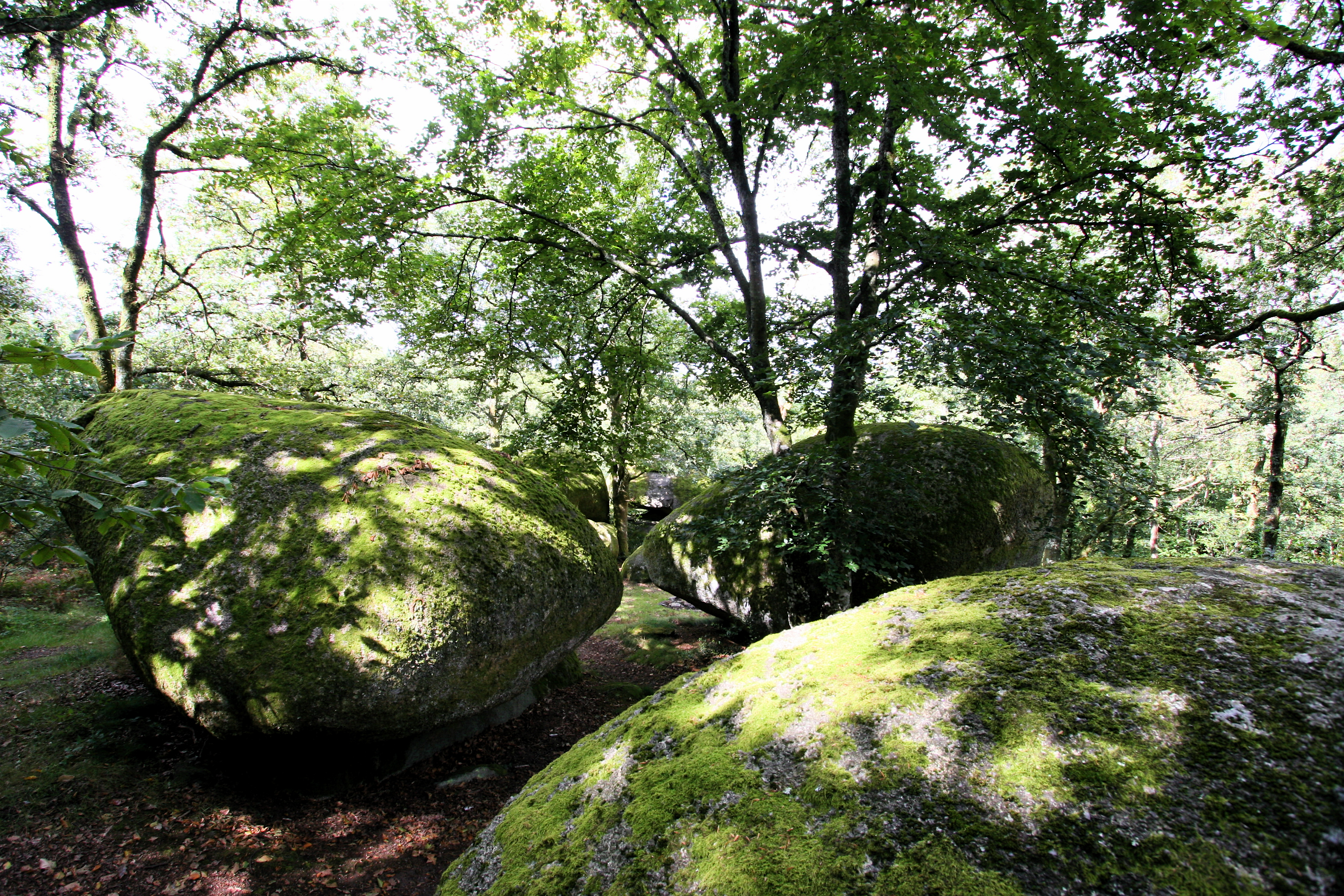 Rochers de Puychaud, Blond, Haute-Vienne, France